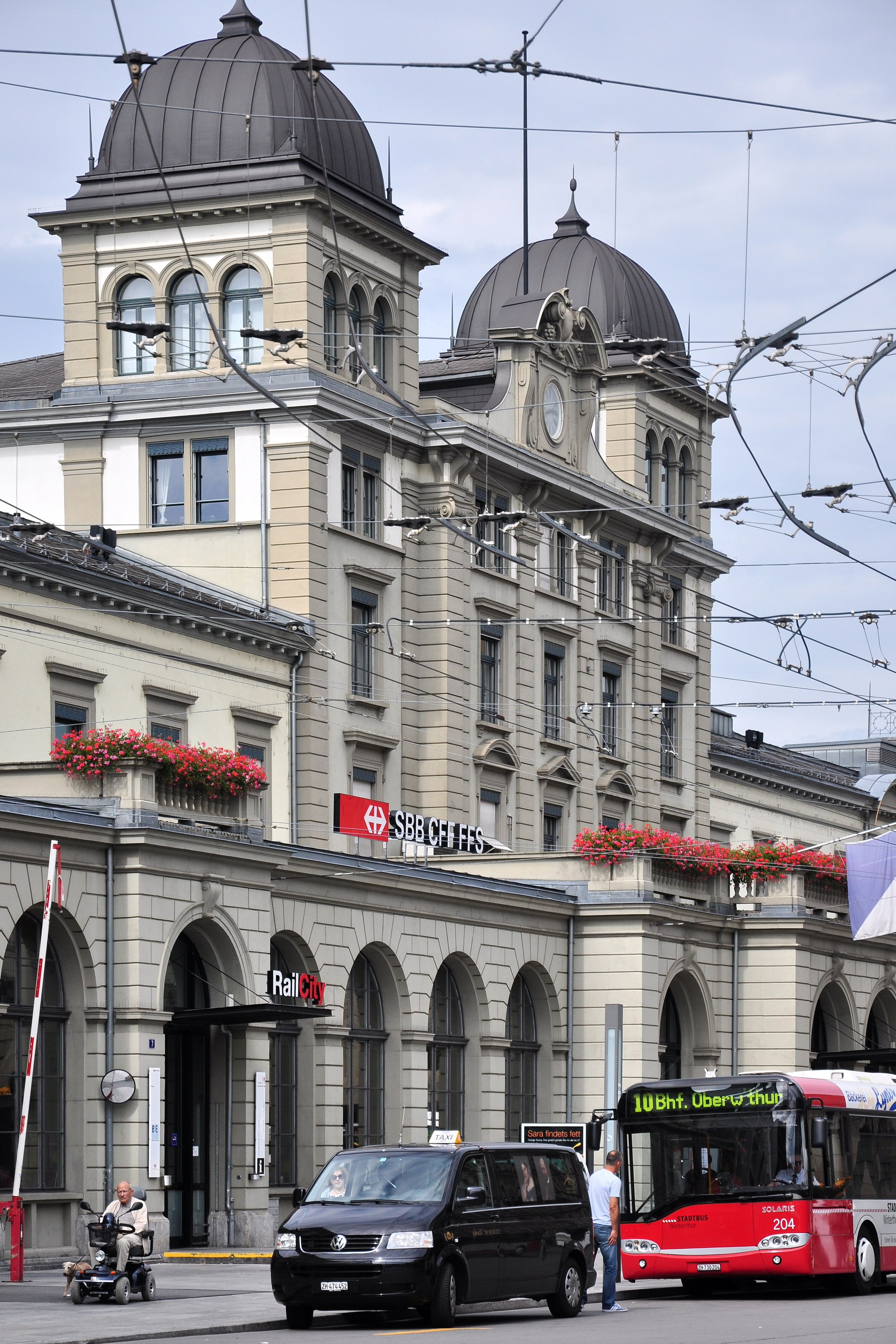 Hauptbahnhof Winterthur, Bahnhofplatz 5–9 in Winterthur (Switzerland)